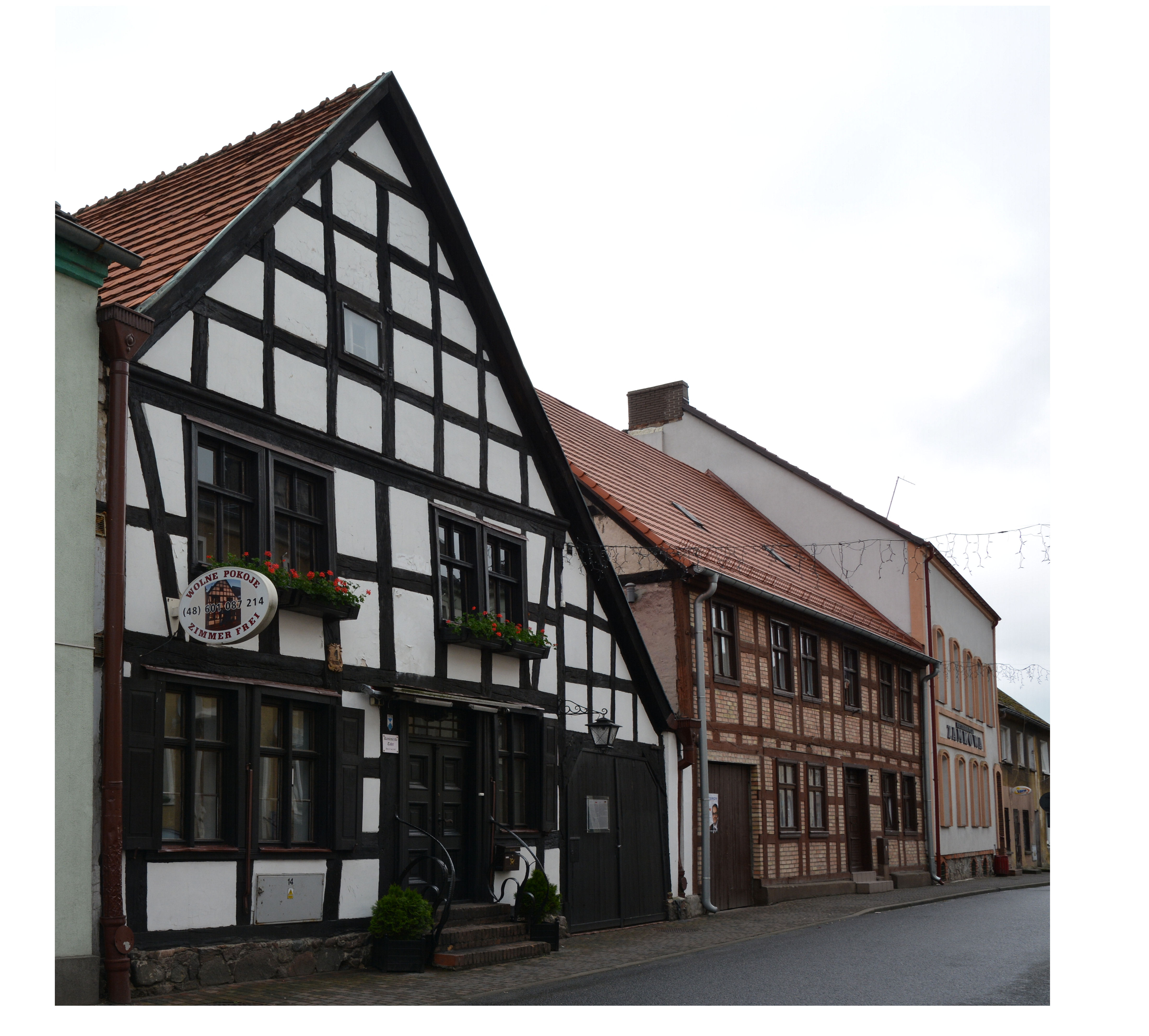 Pensjonat Taber w Dobrej Nowogardzkiej